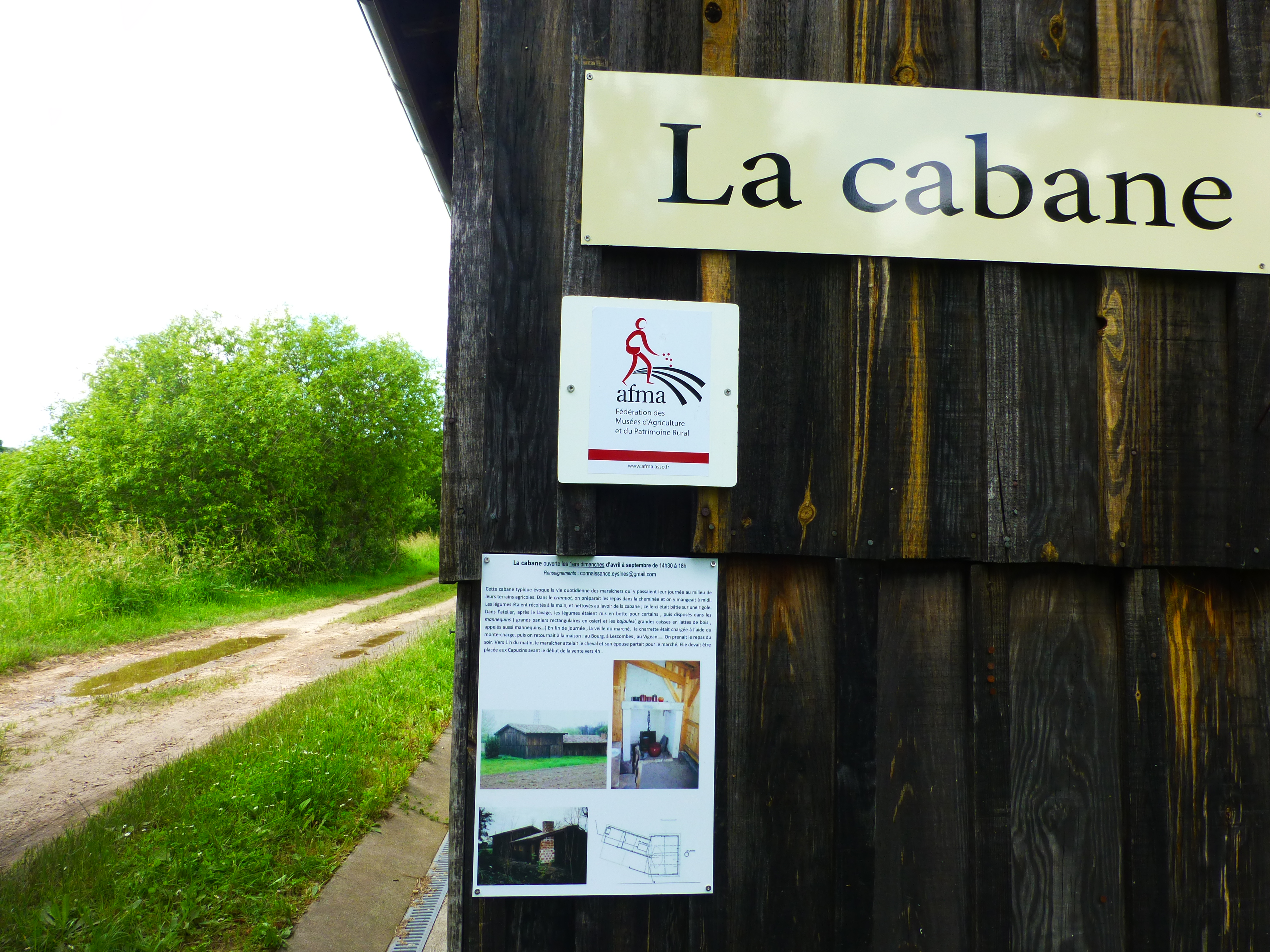 Eysines, Écomusée du maraîchage ː cabane de maraîcher.